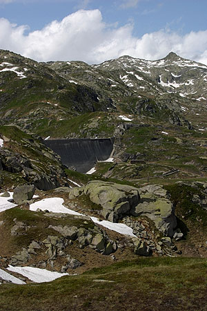 Staumauer des Lago di Lucendro auf dem Gotthard